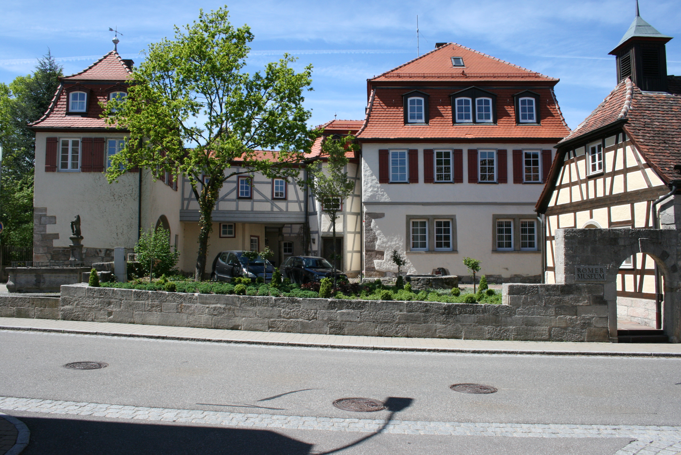 Das Schlössle in Mainhardt, von Osten gesehen